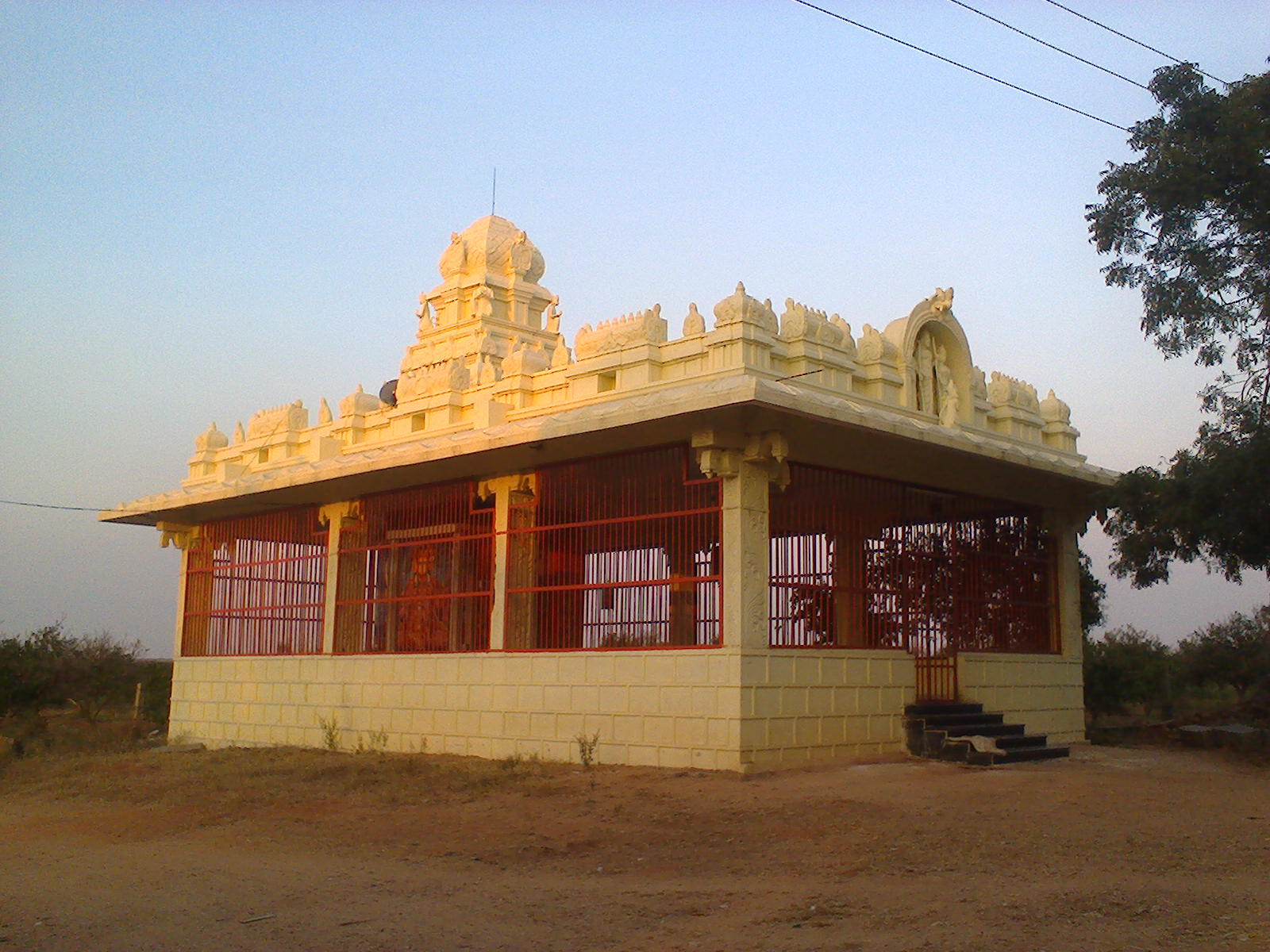 శ్రీఆంజనేయస్వామి దేవాలయం,గోనుపాడు